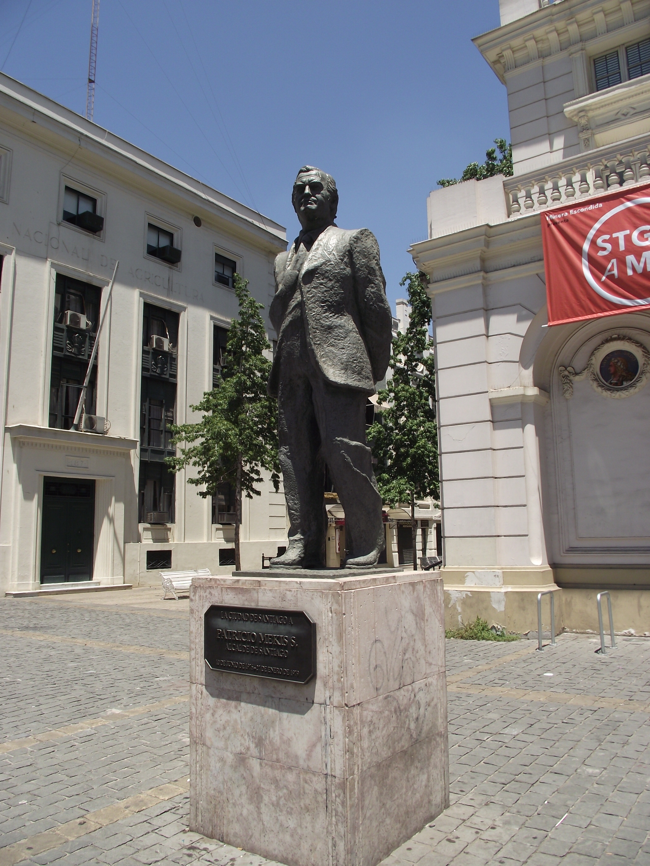 Estatua de Patricio Mekis en la plazoleta homónima, en Agustinas con Tenderini, ante la fachada del Teatro Municipal de Santiago, Chile. La escultura es de Galvarino Ponce.